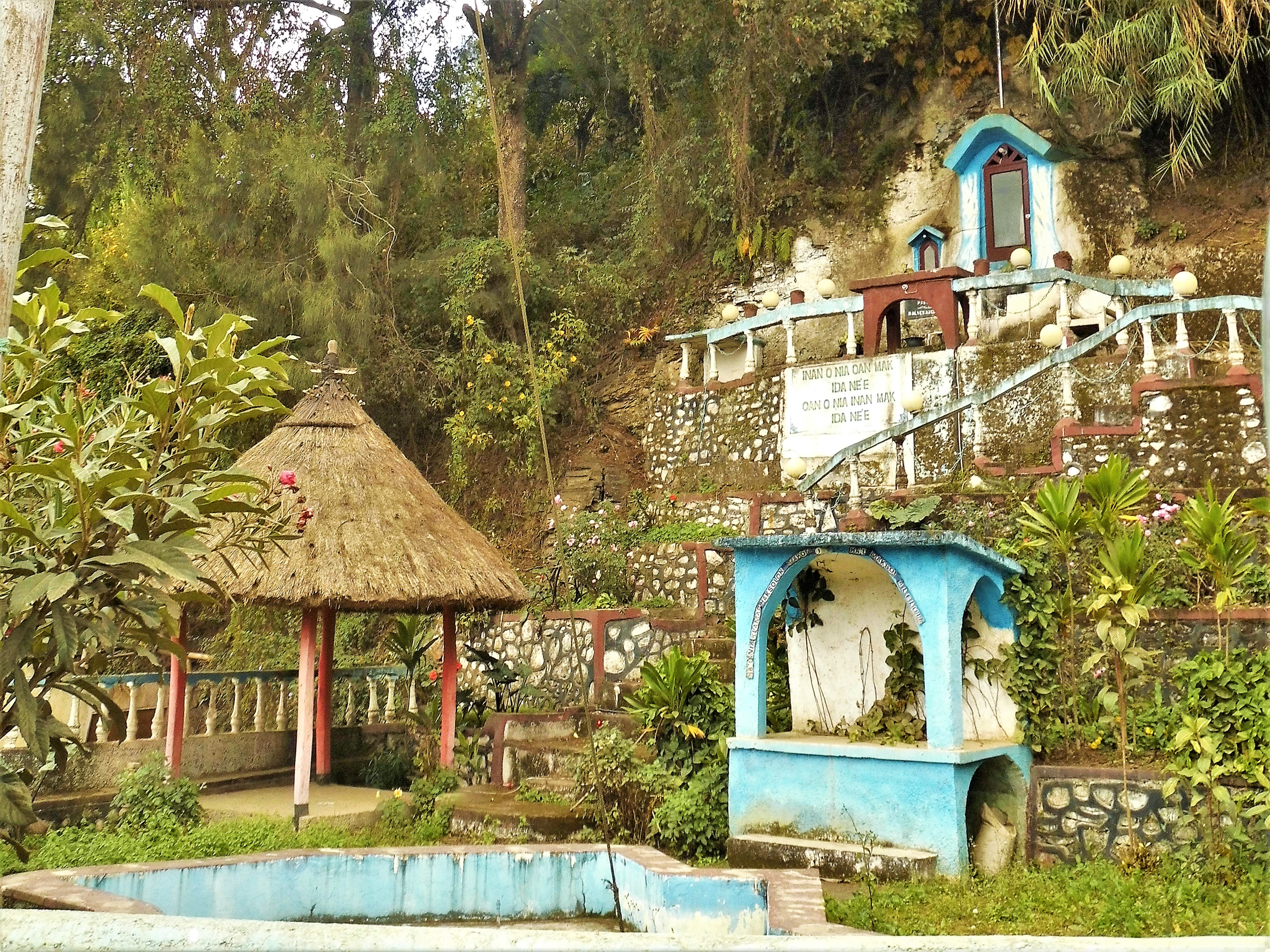 Schrein in Maubisse